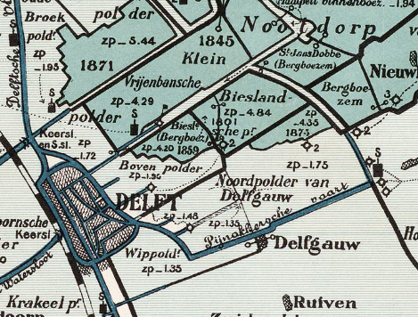 Noordpolder Delfgauw